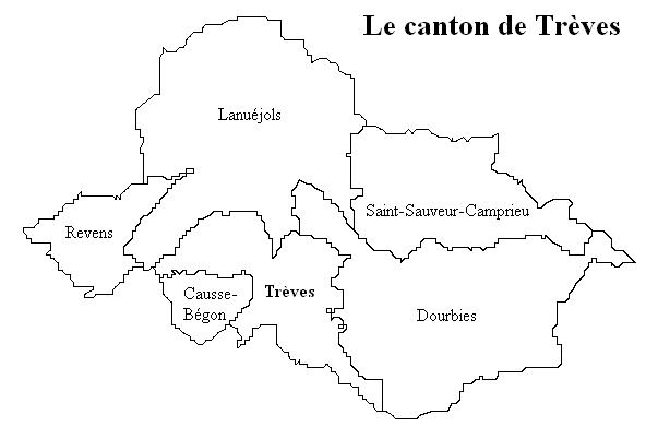 Le canton de Trèves Image personnelle